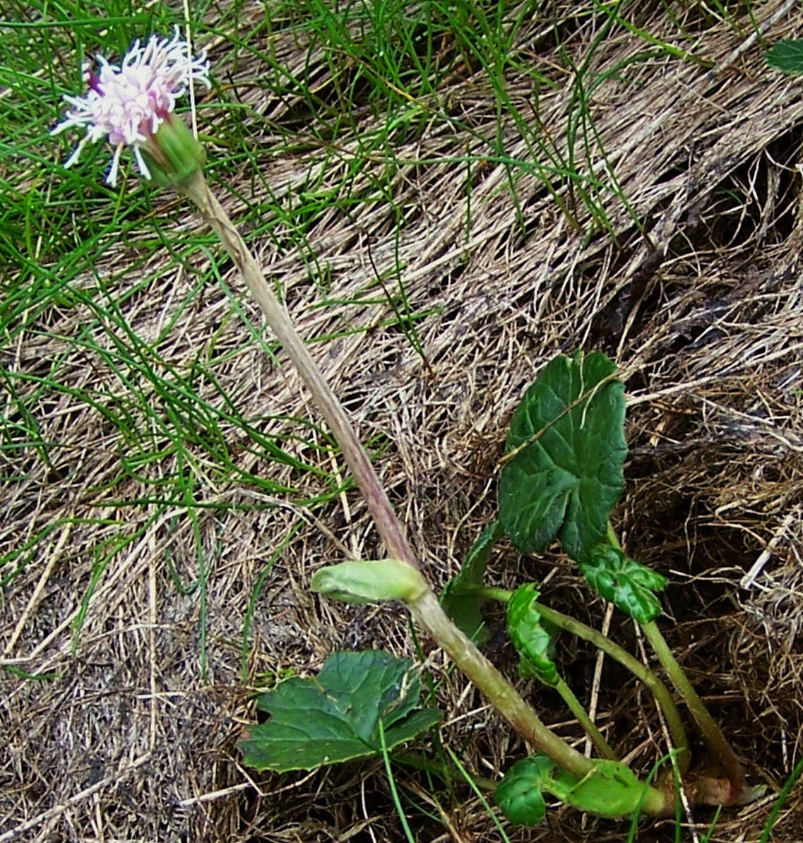 Homogyne alpina (pl. podbiałek alpejski), habitat: Tatra Mountains, Hala Upłaz